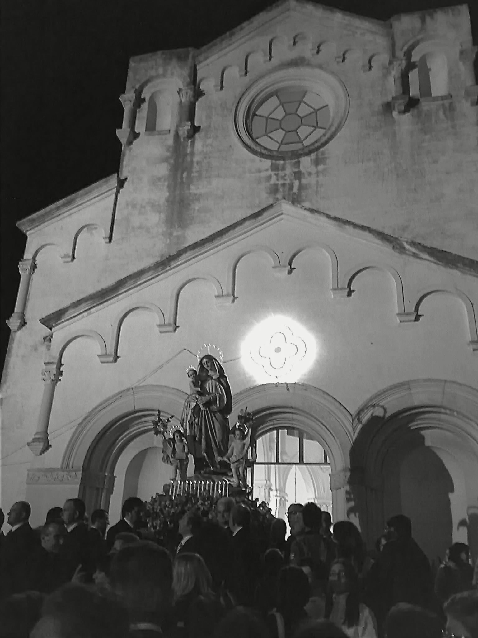 Processione della Madonna del Rito davanti alla Chiesa Maria SS. di Loreto a Noicattaro